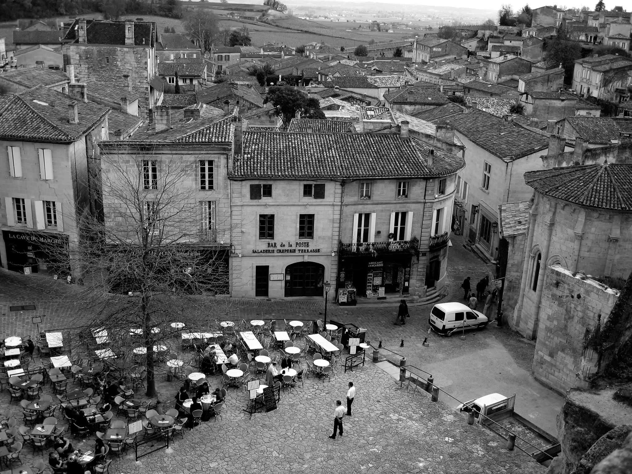 Saint-Émilion, Gironde, France. Vue de la place de l'Église Monolithe. De gauche à droite :rue du Marché, La Cave du Marché ou CAV caveau des vins de Saint-Émilion (n° 1)rue du Thau, en enfilade en direction du sud,place de l'Église Monolithe, L'Émilion ou CAV caveau des vins de Saint-Émilion (n° 5), Bar de la Poste (n° 6), patisserie, fabricant de macarons (n° 7)rue de la Petite Fontaine, en enfilade en direction du sud,à l'extrémité droite, chevet de la chapelle de la Trinité.